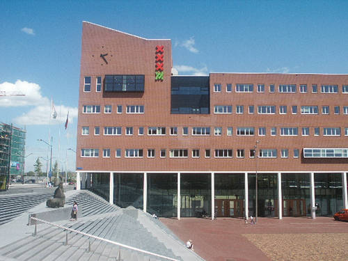 Stadsdeelkantoor, Anton de Komplein, Amsterdam Zuidoost